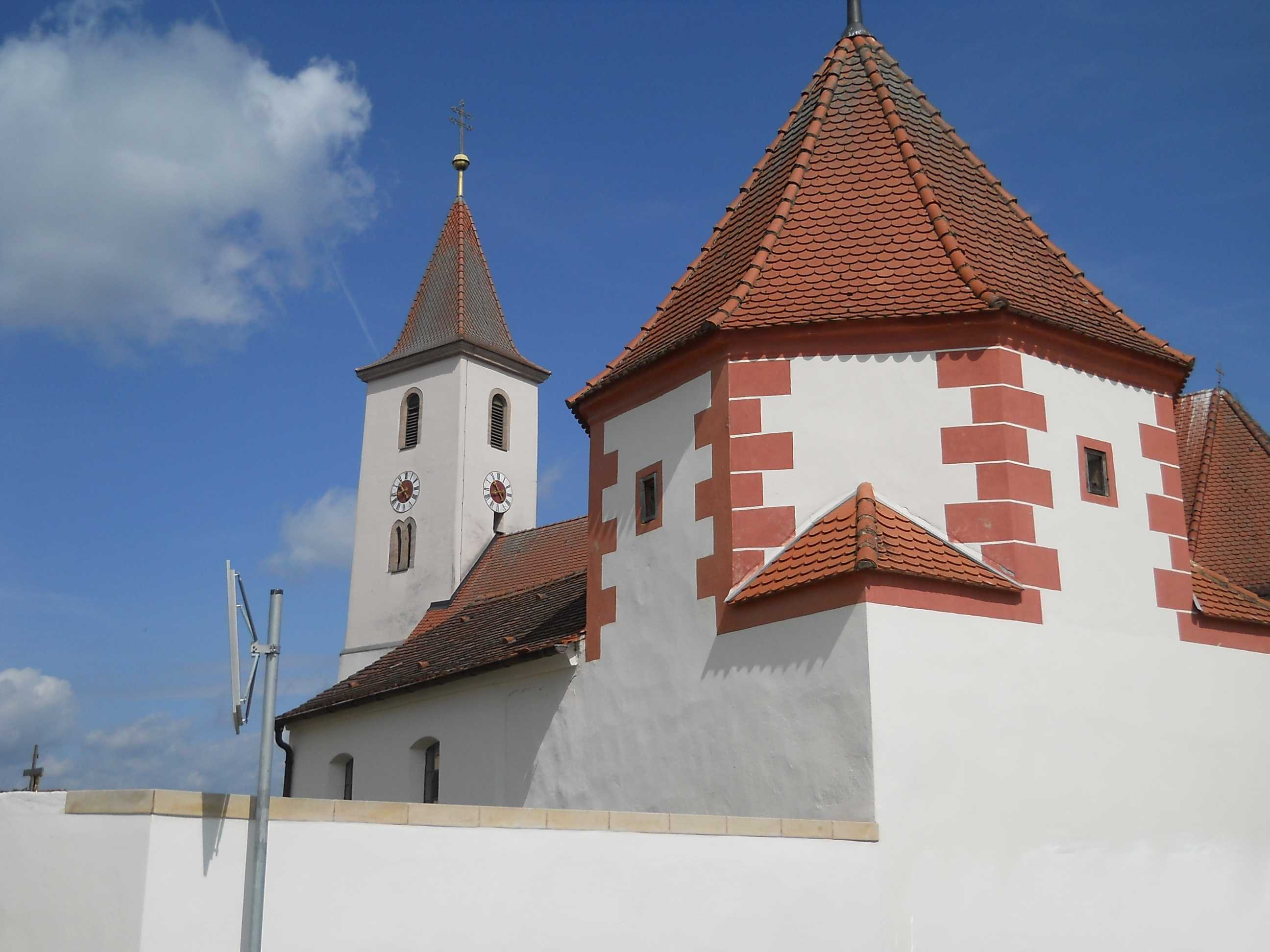 Rauenzell, Ortsteil von Herrieden im Landkreis Ansbach (Bayern), Kath. Pfarrkirche Mariä Heimsuchung, mit Friedhofskapelle (ehem. Johanneskapelle)